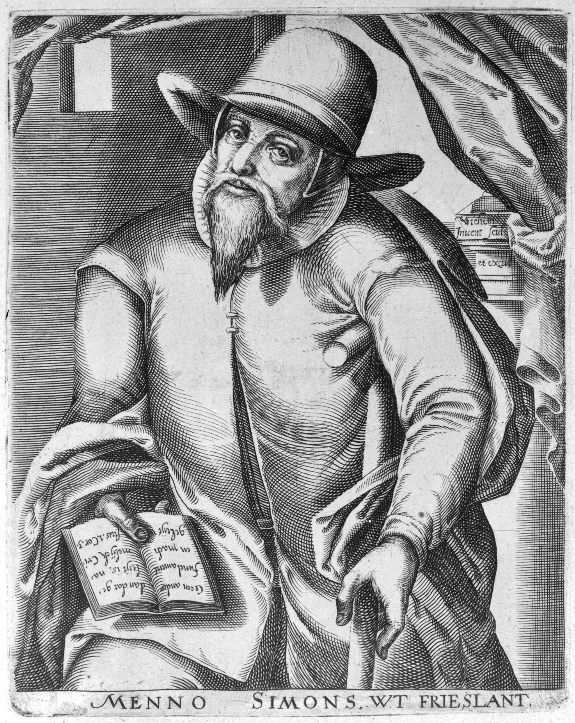 Collectie / Archief : Fotocollectie Anefo / Londen Reportage / Serie : P [Portraits/Persons] / Anefo Londen serie Beschrijving : Menno Simonsz (1496-1561), geestelijk vader van de doopsgezinden Datum : 1940-1945 Trefwoorden : portretten Persoonsnaam : Simons, Menno Fotograaf : Onbekend / Publiek Domein Auteursrechthebbende : Nationaal Archief Materiaalsoort : Negatief (zwart/wit) Nummer archiefinventaris : bekijk toegang 2.24.01.04 Bestanddeelnummer : 935-0851